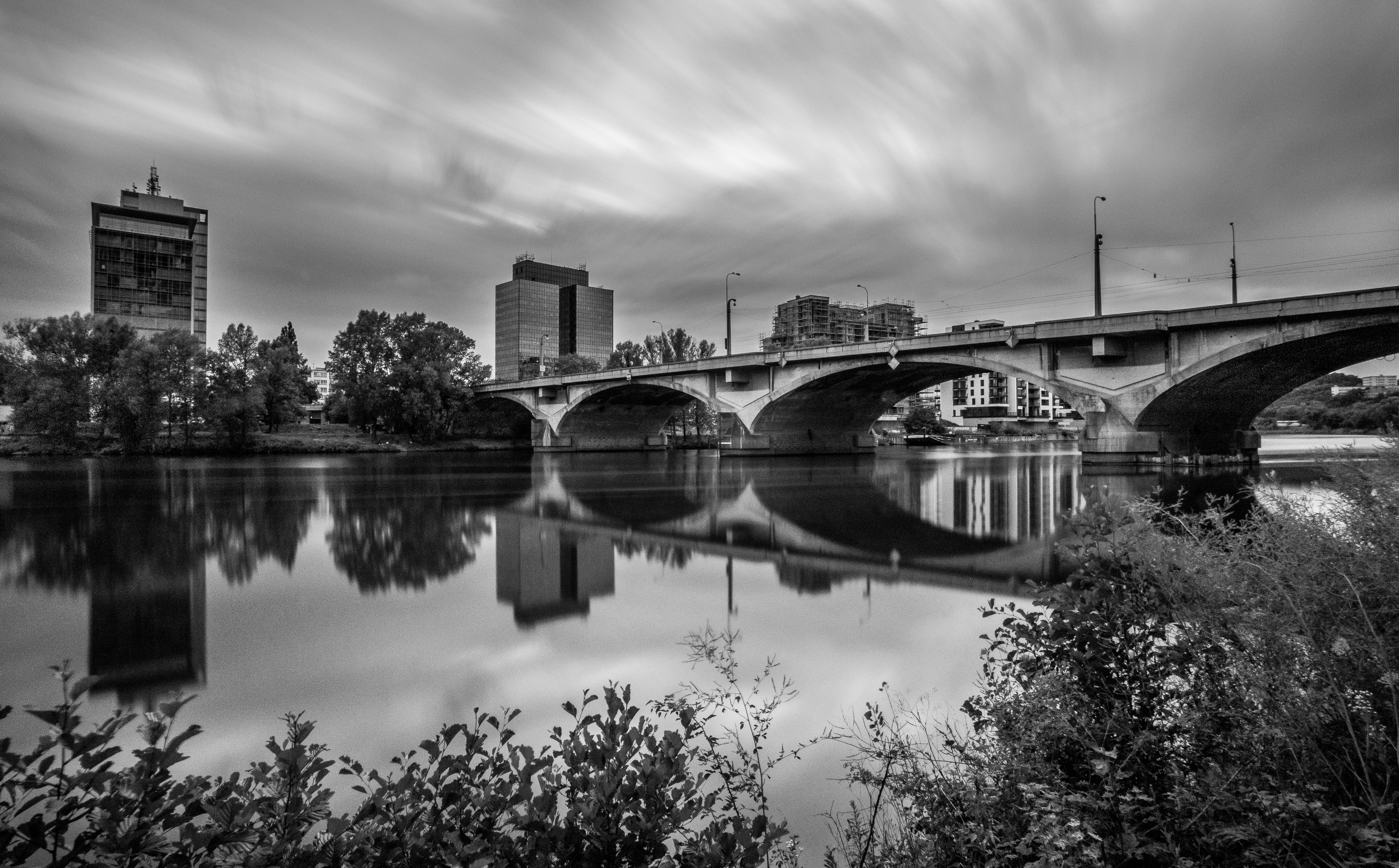 Uprostřed moderní architektury umístěn tento skvost. Foceno v podvečer, krátce před západem slunce.